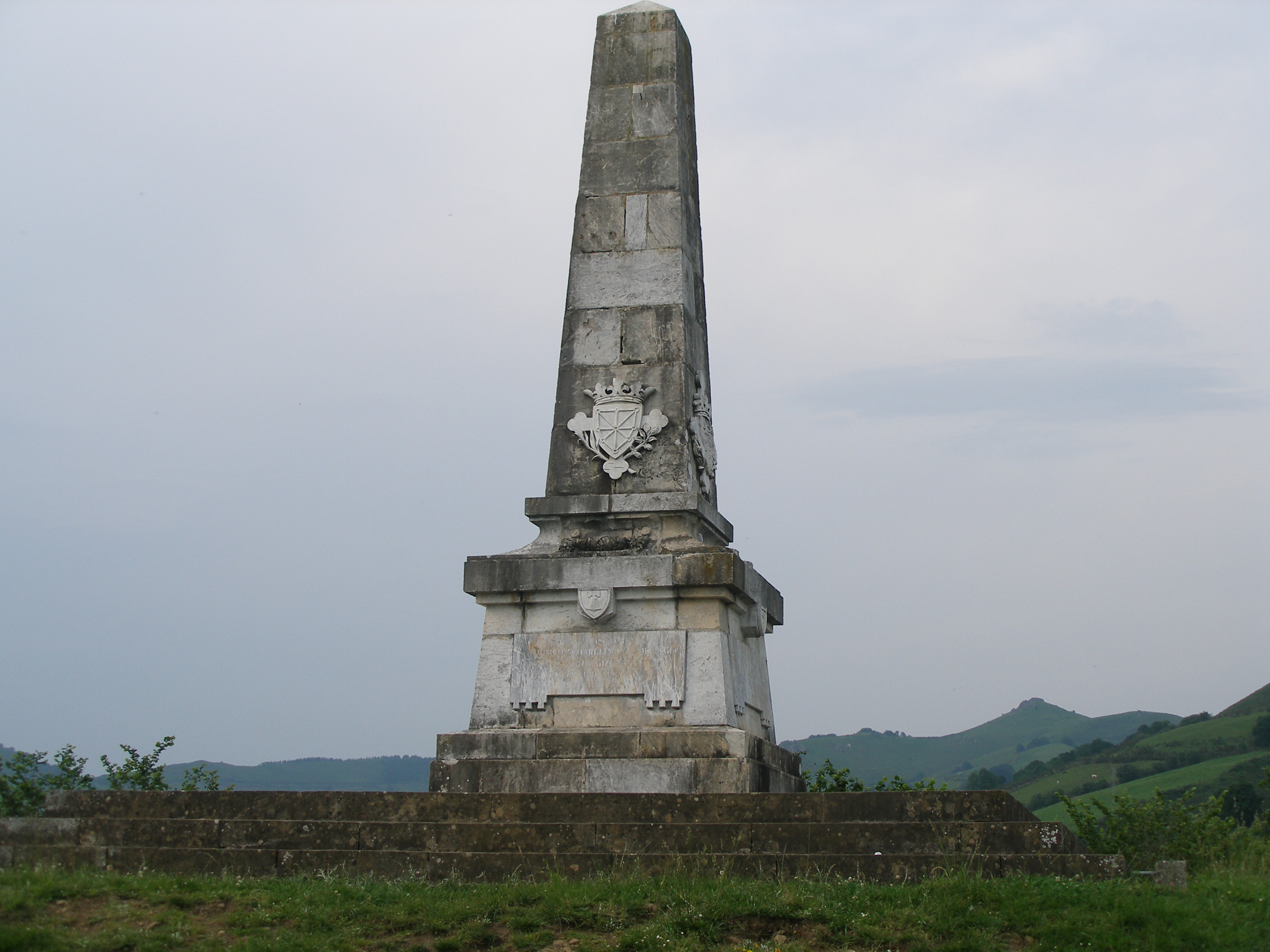 Monolito de la resistencia en Amaiur.